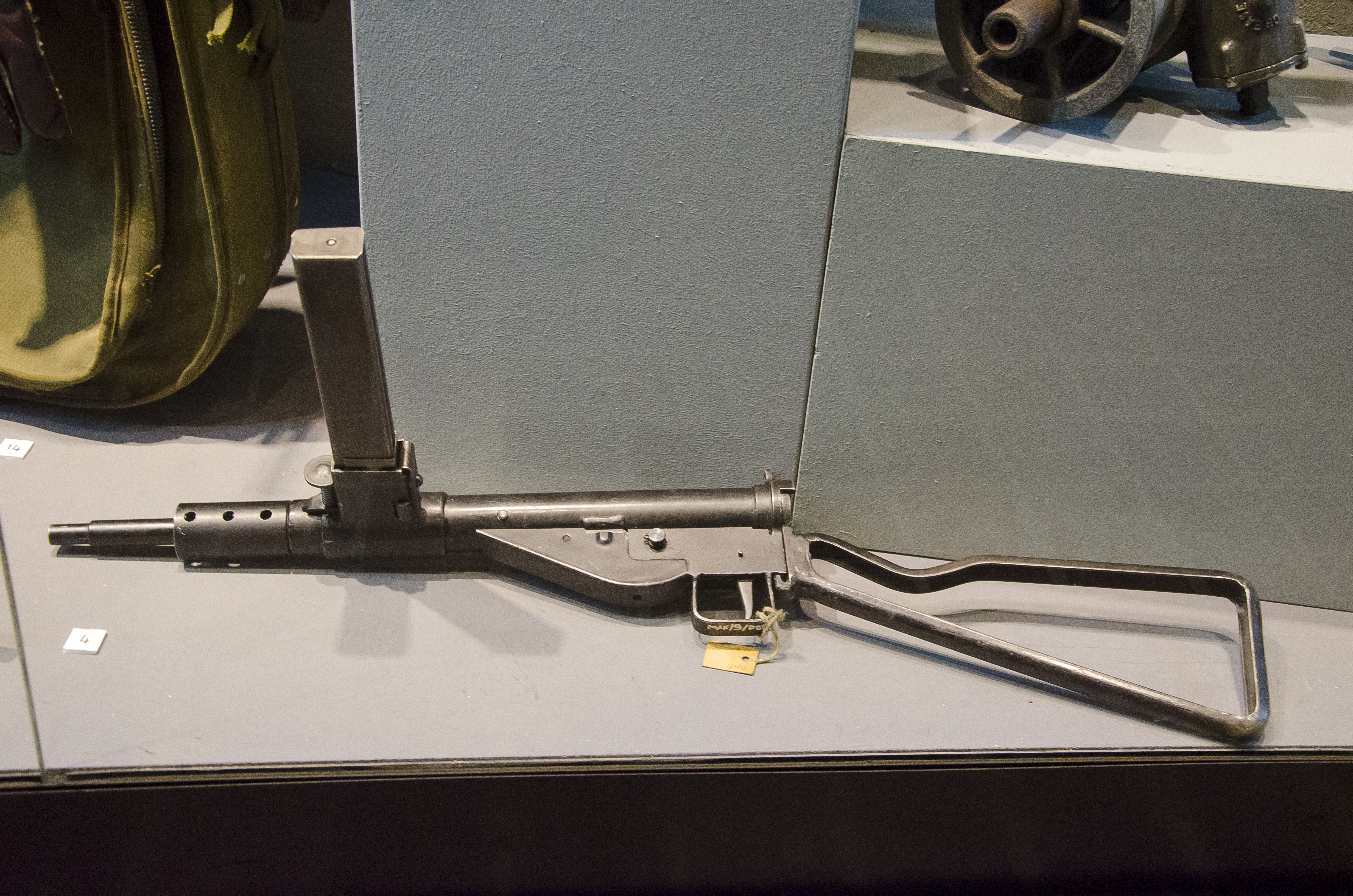 Warszawskie, Kraków, Poland